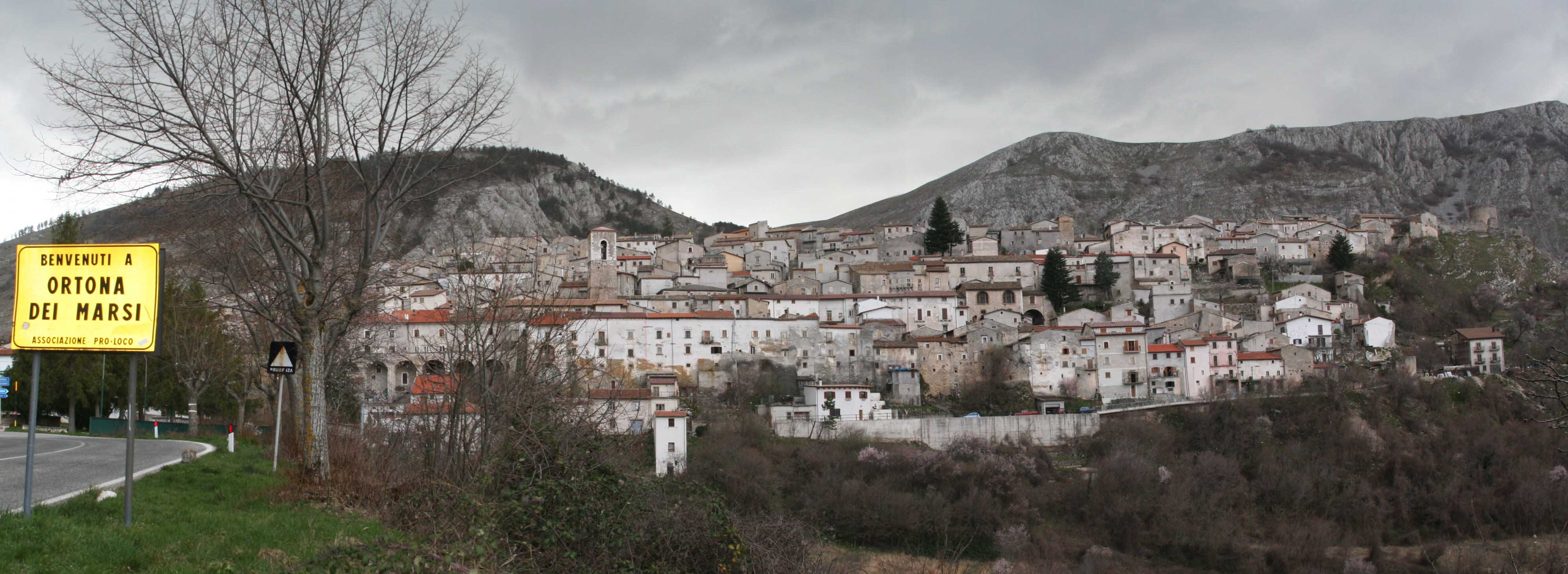 Ortona dei Marsi